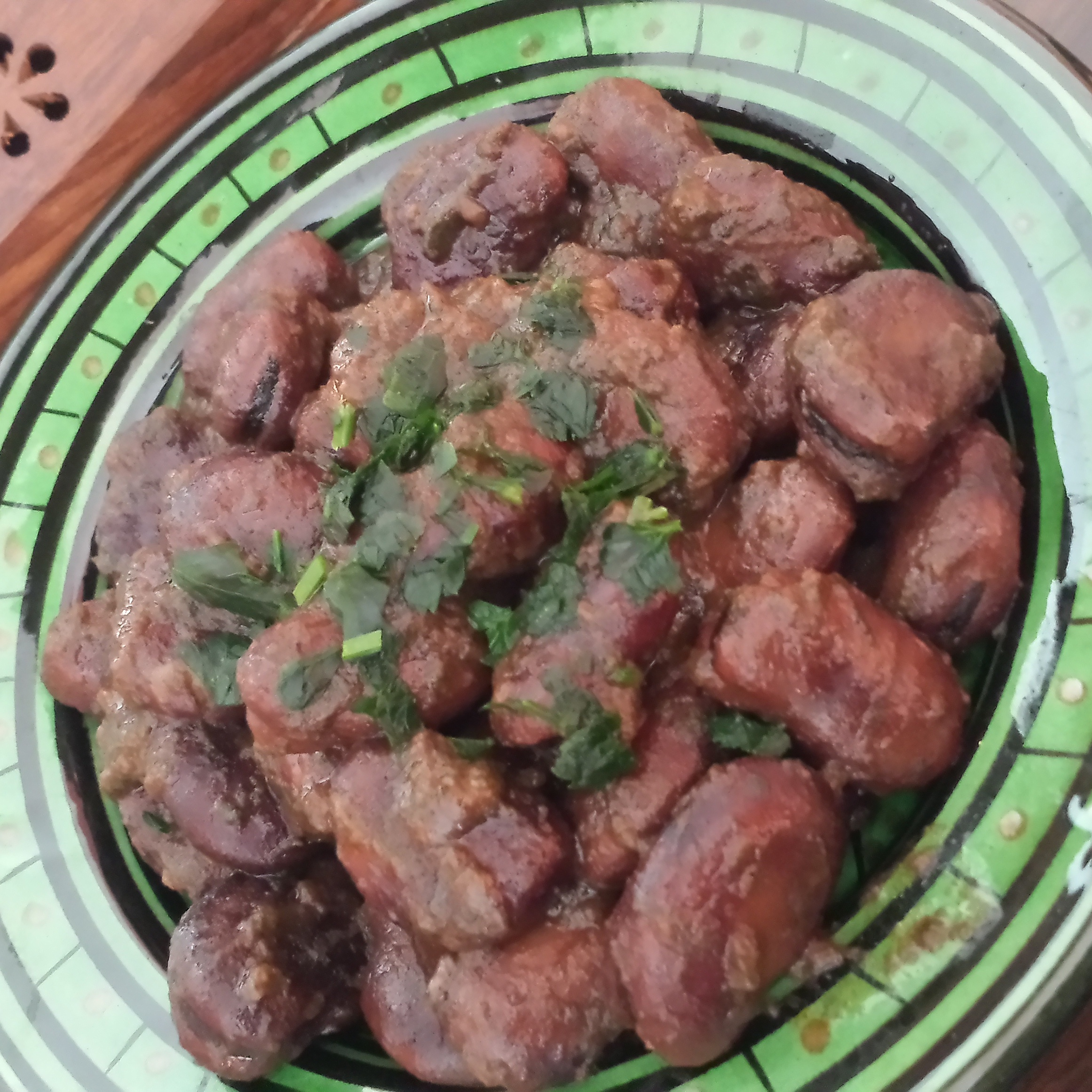 Une des entrées chaudes marocaines celle de fêves persillade et épices (pulpe de tomate parfois), connue selon les régions sous le nom (foul mengoub, foul mchermel). This is an image of food from Morocco